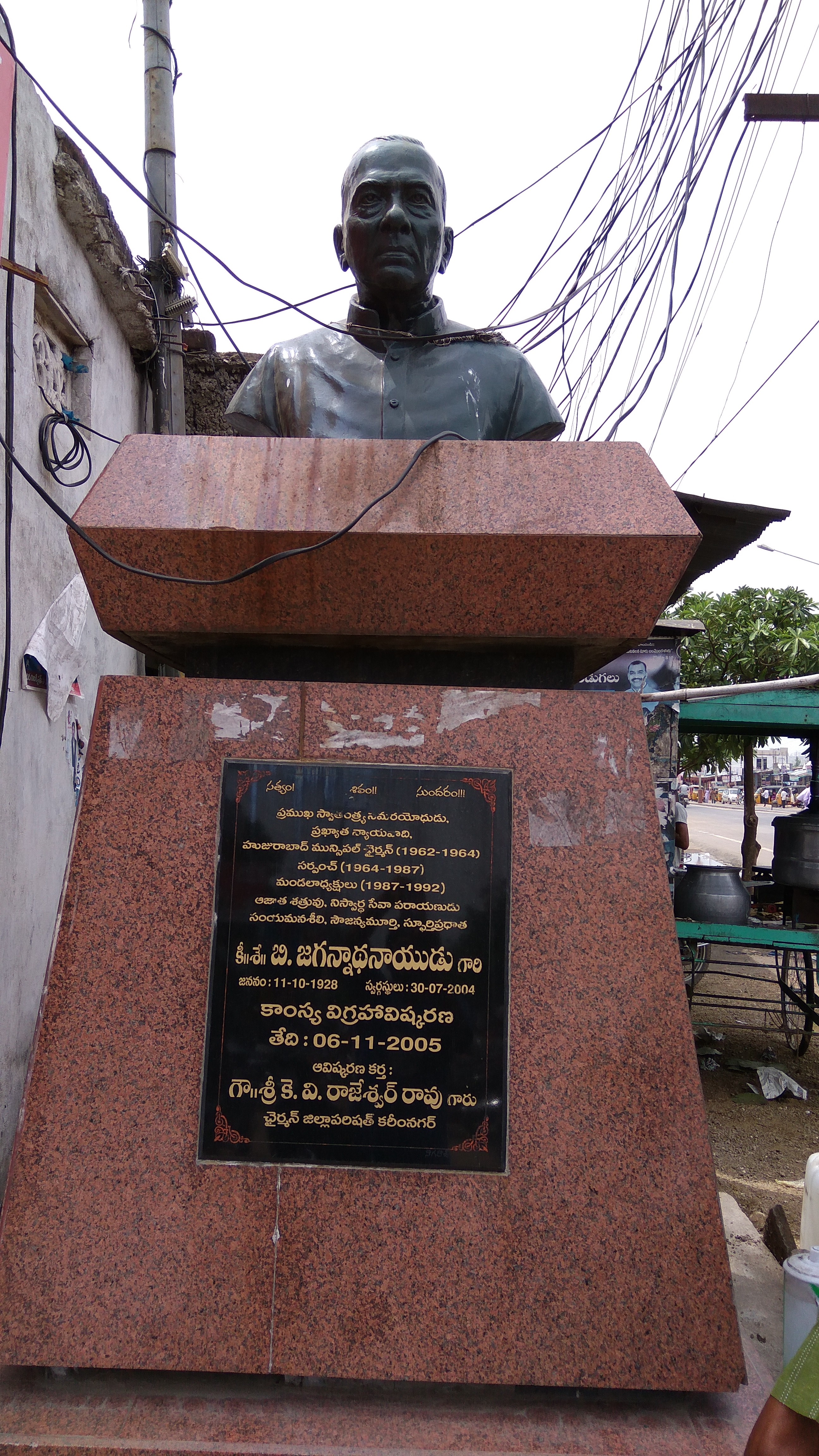 హుజురాబాద్ లోని జగన్నాధనాయుడి విగ్రహం